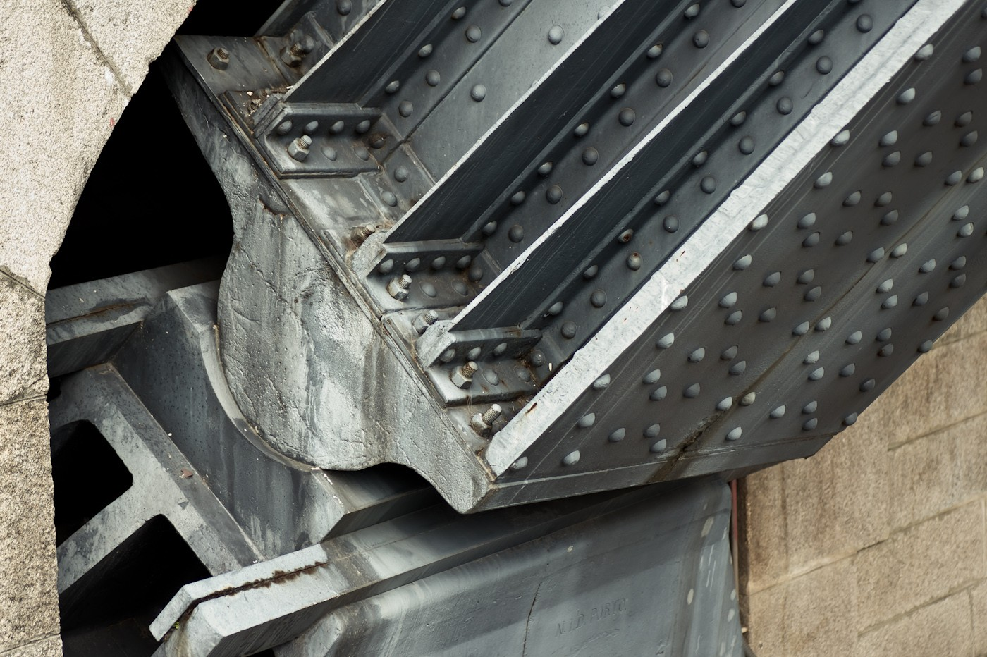 Soporte